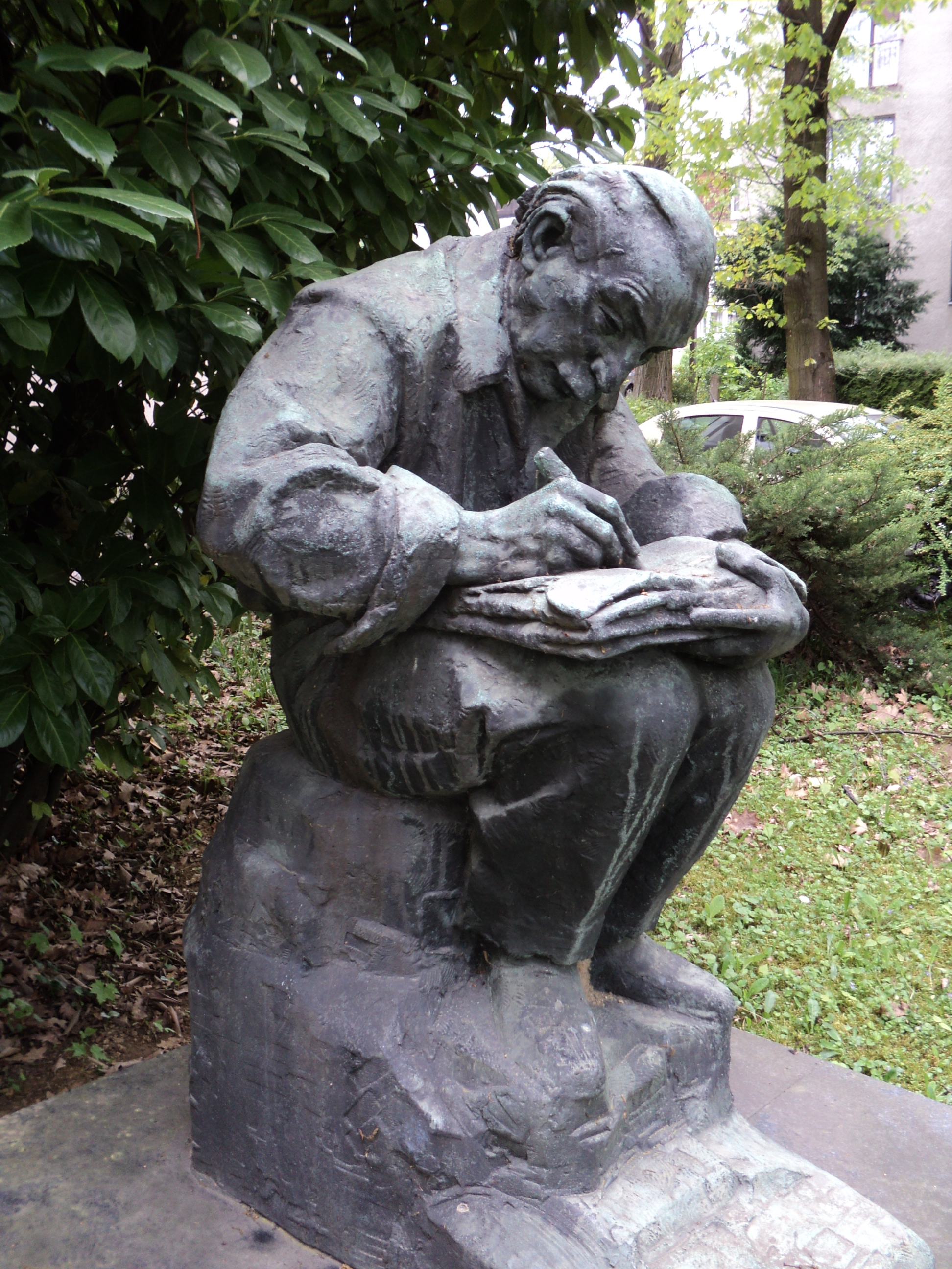 Spomenik Moše Pijade u Zagrebu, rad Antuna Augustinčića.